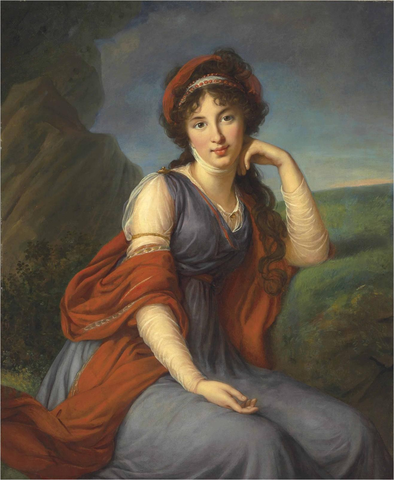 Мария Григорьевна Разумовская (1772-1865), ур. Вяземская, в 1 браке за А.Н.Голицыным.